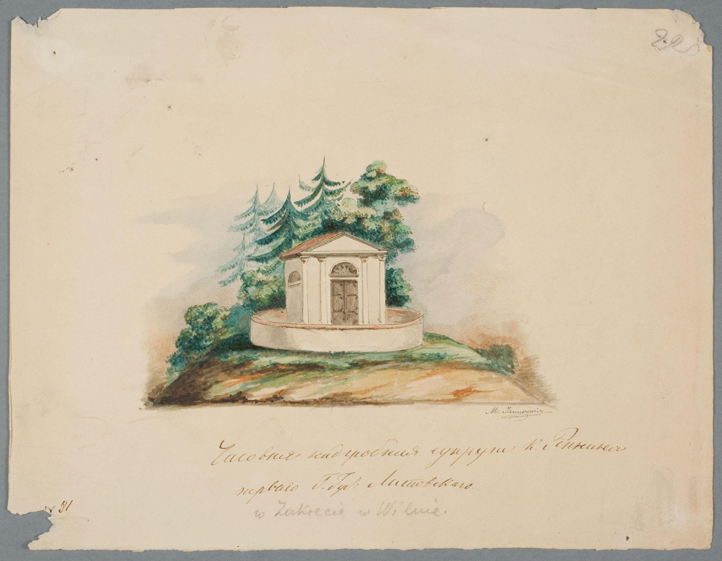 Беларуская (тарашкевіца): Вільня (Vilnia), Закрэт (Zakret). Капліца